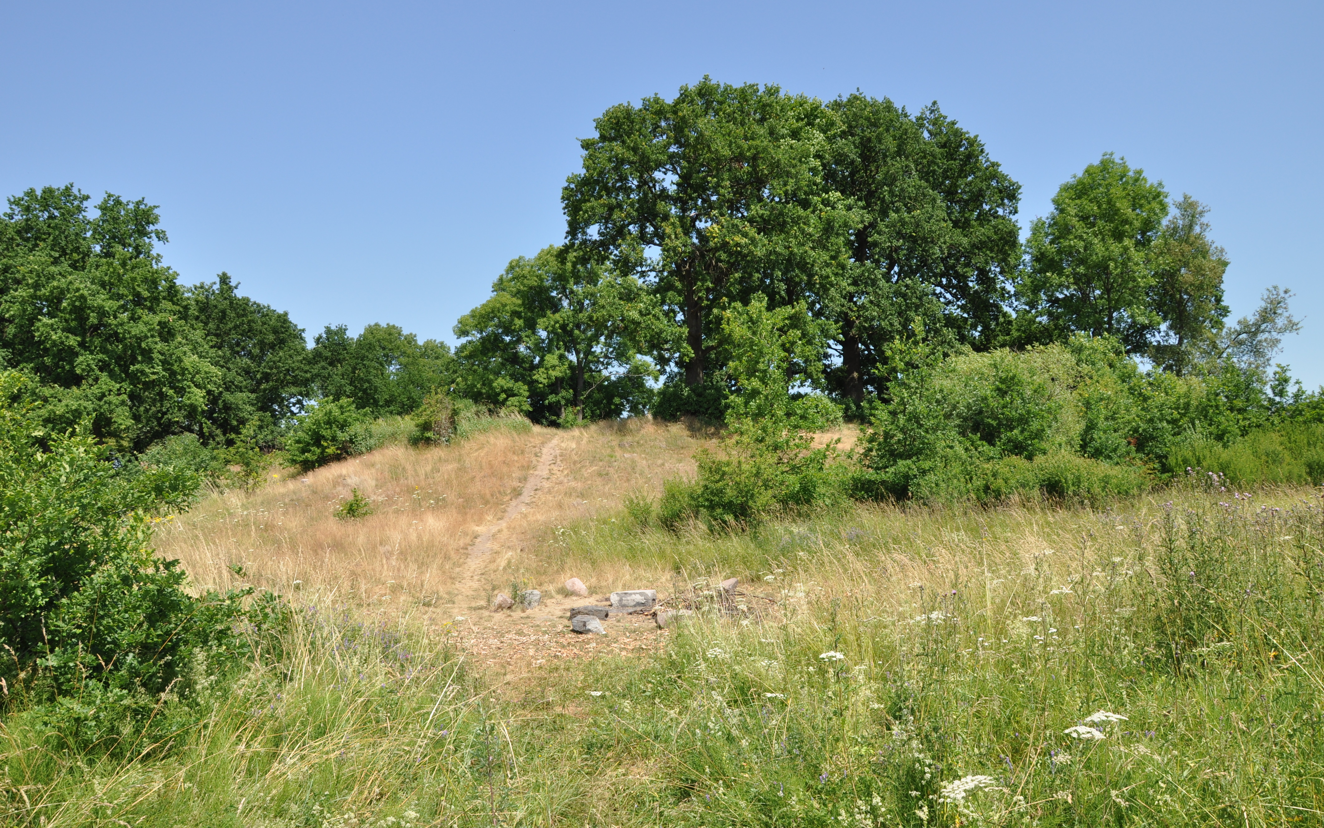 Pagórek Wyszkowo od strony południowo-zachodniej, od Regi, w Trzebiatowie